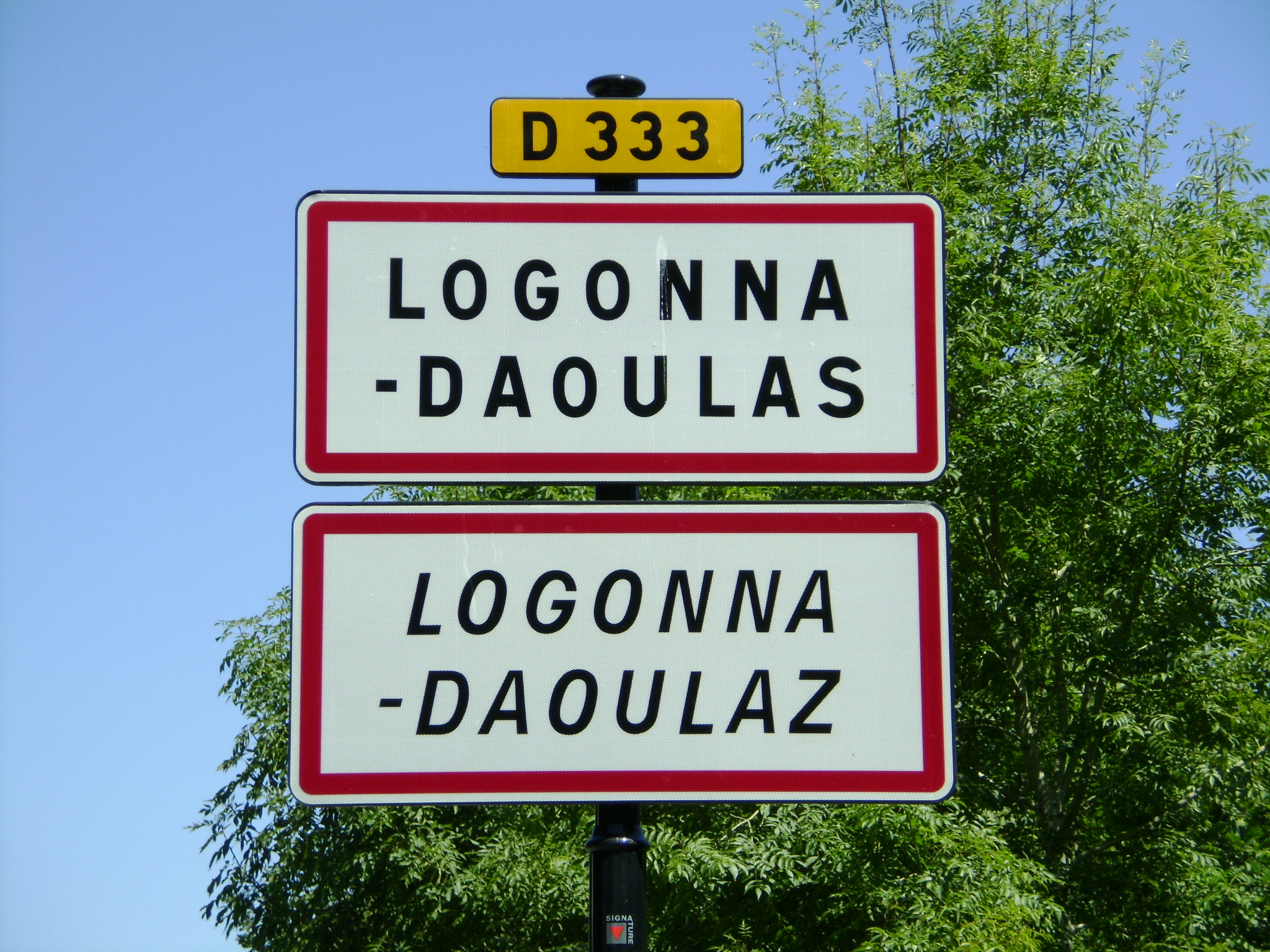 Logonna-Daoulaz.JPG